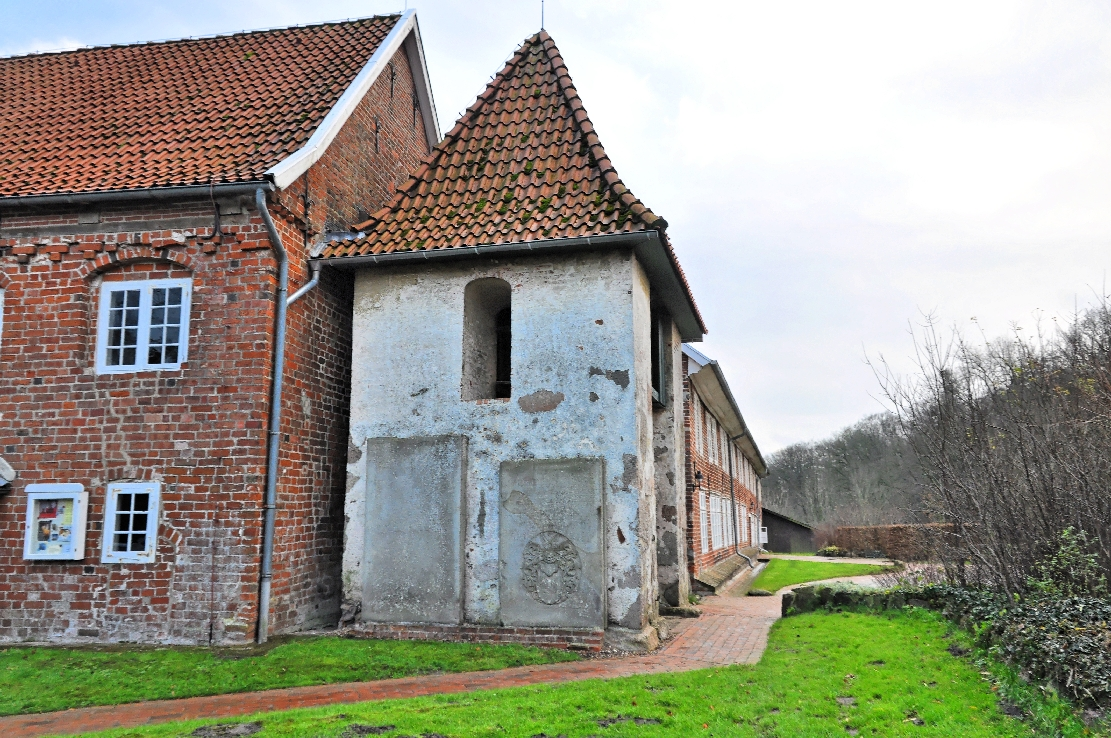 Neuenwalde 2012